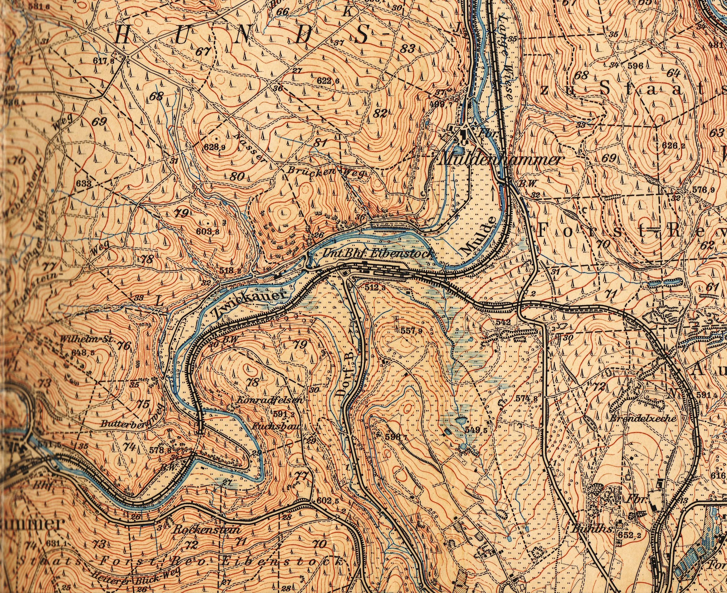 Muldenhammer (Eibenstock) und Eibenstock unterer Bahnhof im Tal der Zwickauer Mulde: Der heute in der Talsperre Eibenstock versunkene Abschnitt der Mulde. Westlich ist der Bahnhof Schönheiderhammer (Bahnhofsbezeichnung seit 1950: Schönheide Ost) zu sehen, bis dorthin reicht das in der Talsperre gestaute Wasser. Außerhalb des nördlichen Kartenrands steht die Staumauer. Landkarte aus der Zeit um 1900. Die Karte im Maßstab 1 : 25.000 zeigt zahlreiche Details.